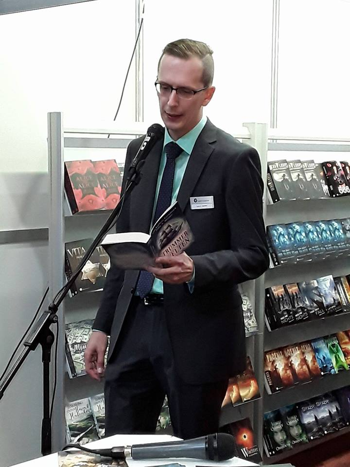 Felix Münter liest auf der Leipziger Buchmesse 2017 aus seinem neuesten Roman "Trümmerwelten: Das Geheimnis der Alice Sparrow".